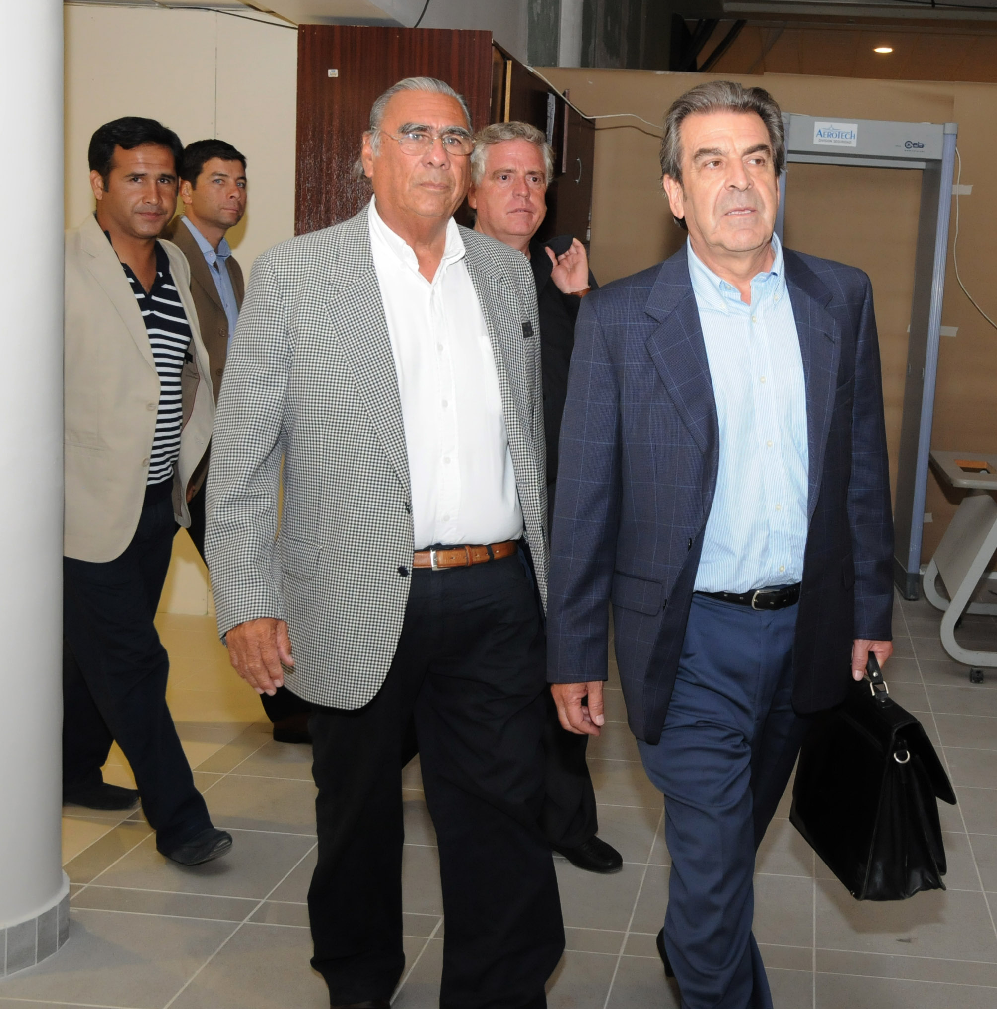 Reunión de Eduardo Frei y Jorge Soria en Iquique, 2009.